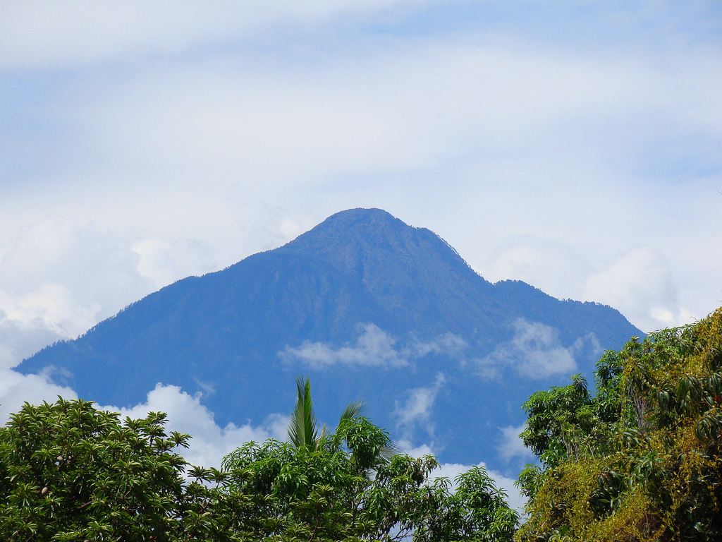 Volcán Tacaná, desde México.